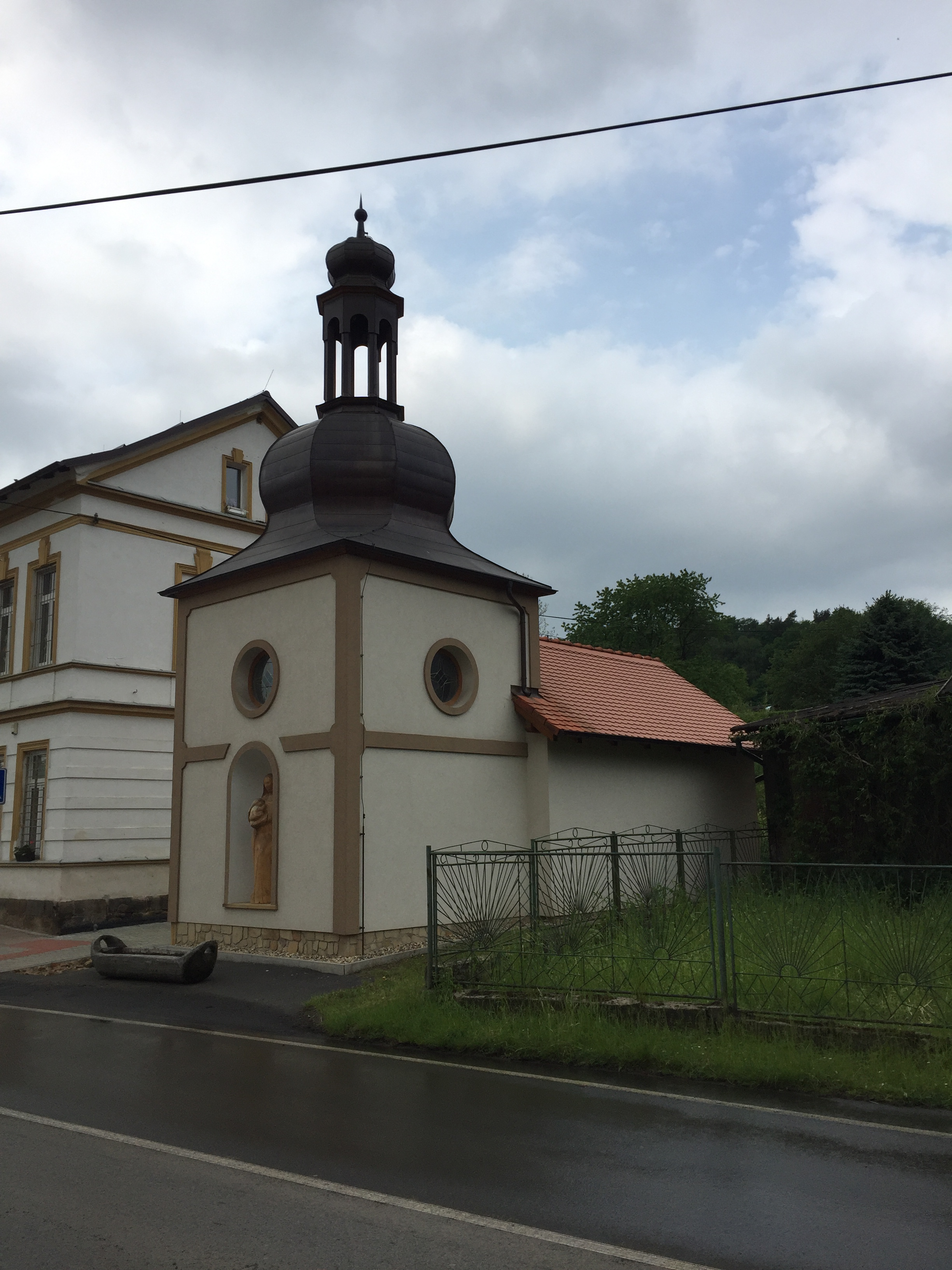 Kaple, Ludvíkovice - průčelí a bok